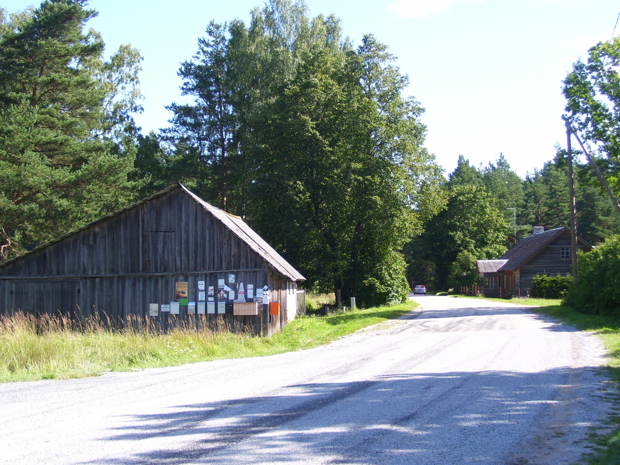 Pudisoo (Kuusalu vald), küla keskus.